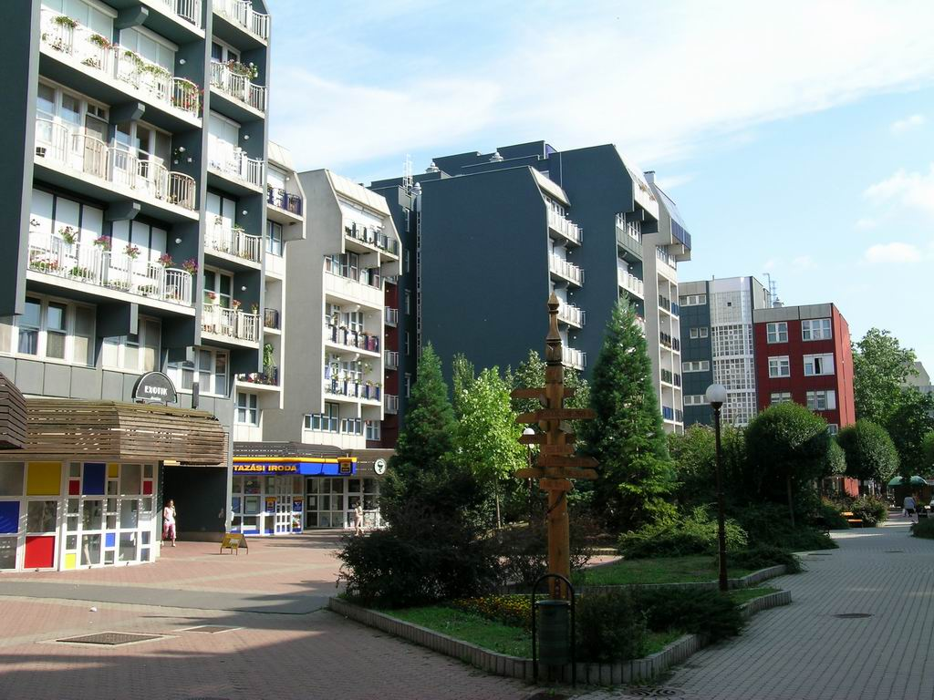 Csipkeházak Zalaegerszegen